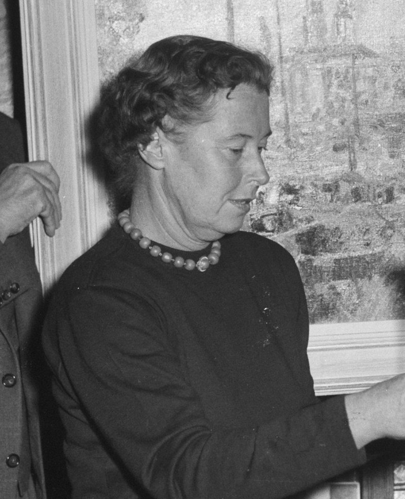 Collectie / Archief : Fotocollectie Anefo Reportage / Serie : [ onbekend ] Beschrijving : Huldiging van mevrouw Bouman door Groningers te Den Haag Datum : 14 november 1956 Locatie : Den Haag, Groningen Trefwoorden : huldigingen, vrouwen Persoonsnaam : Bouman Fotograaf : Bilsen, Joop van / Anefo Auteursrechthebbende : Nationaal Archief Materiaalsoort : Negatief (zwart/wit) Nummer archiefinventaris : bekijk toegang 2.24.01.04 Bestanddeelnummer : 908-1411